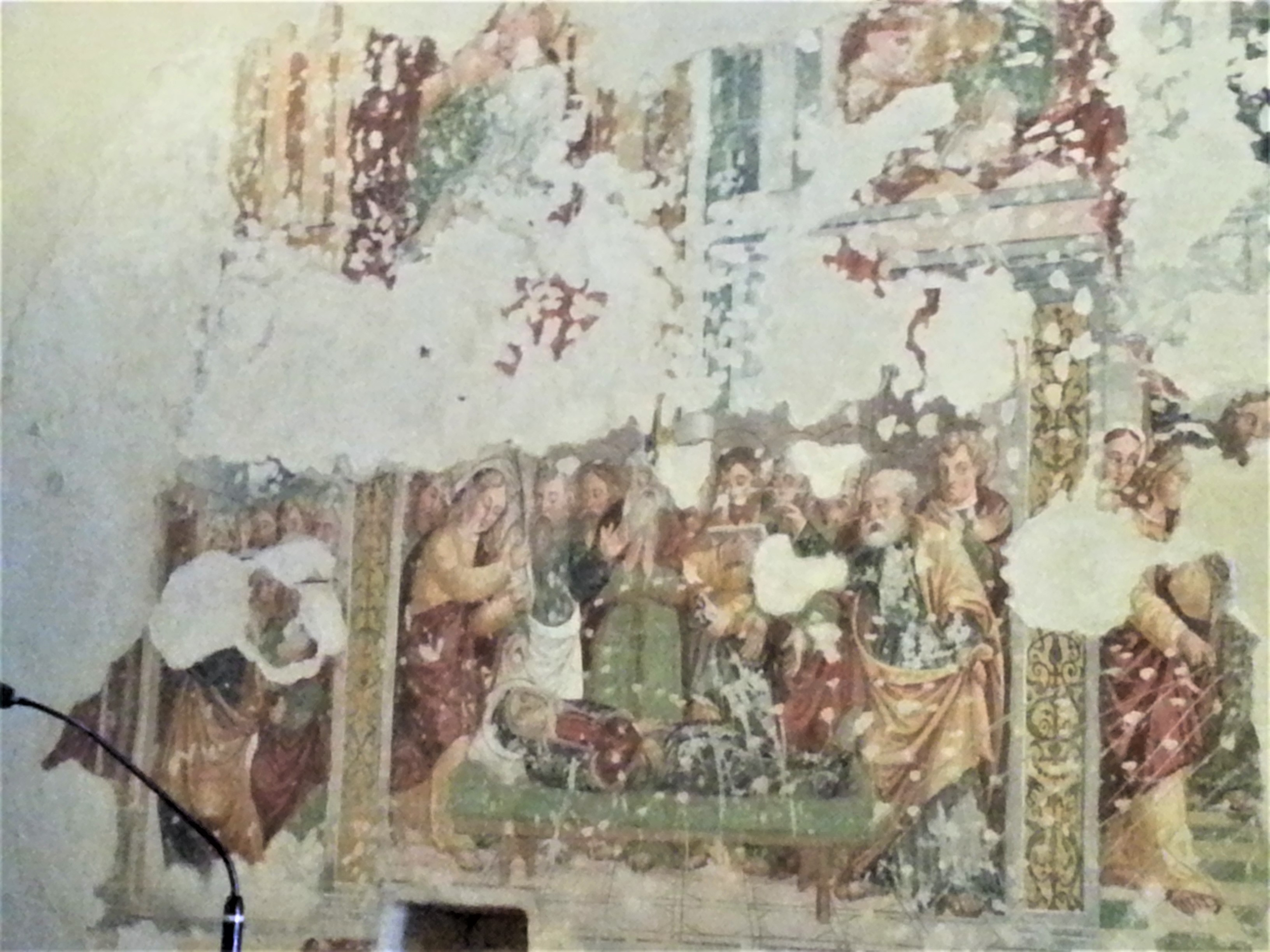 affersco del XIV secolo Madonna dormiente